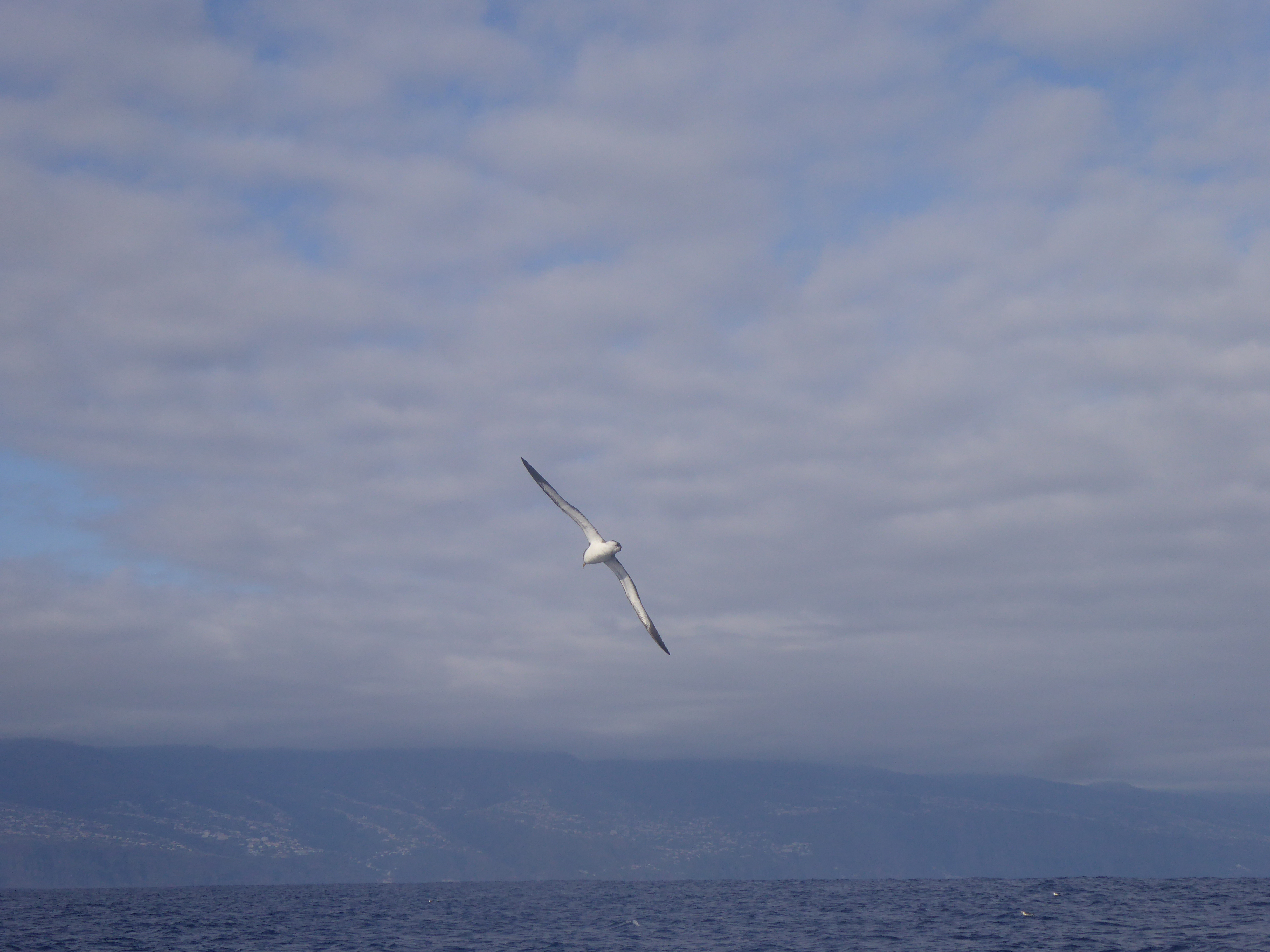 Madeira-Sturmvogel südwestlich von Madeira